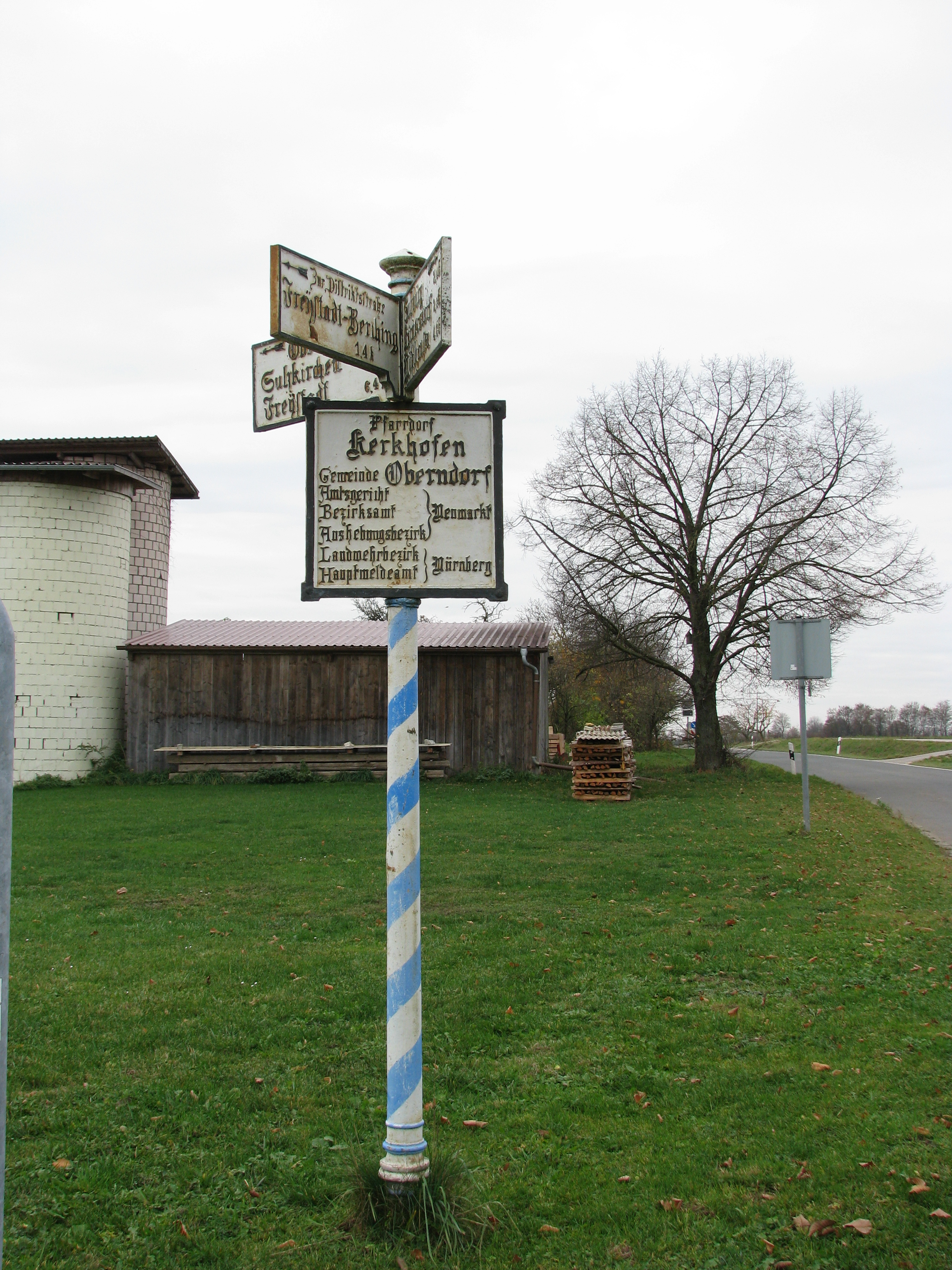 Kerkhofen, Ortsteil von Mühlhausen im Landkreis Neumarkt in der Oberpfalz, gusseiserner Wegweiser (um 1900)